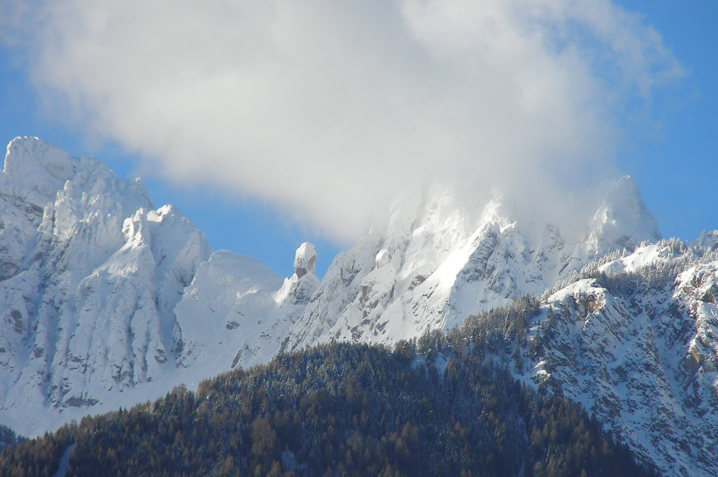 Le Marmarole d'inverno Viste da Lorenzago